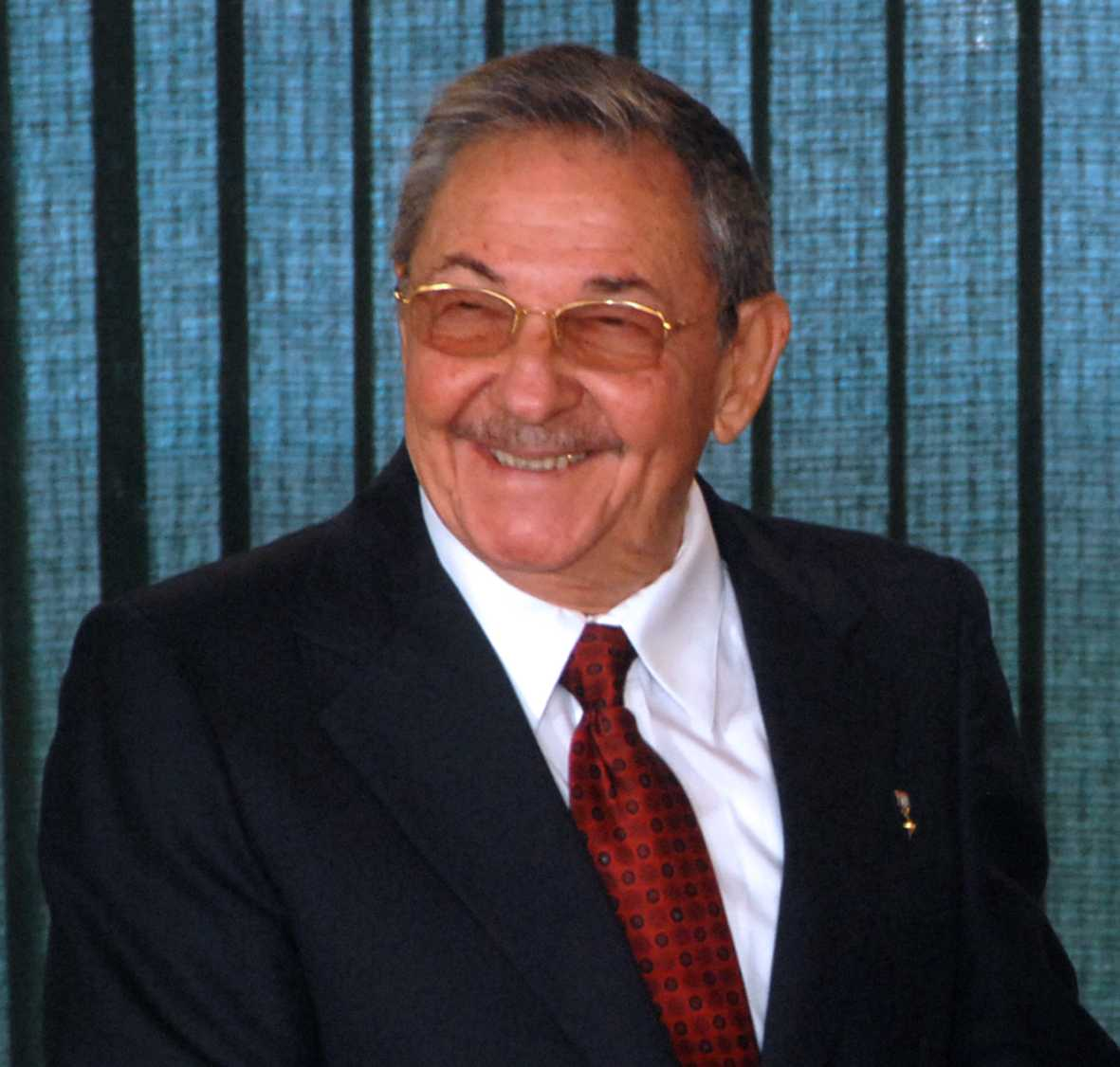 Presidente de Cuba, Raúl Castro (2008).